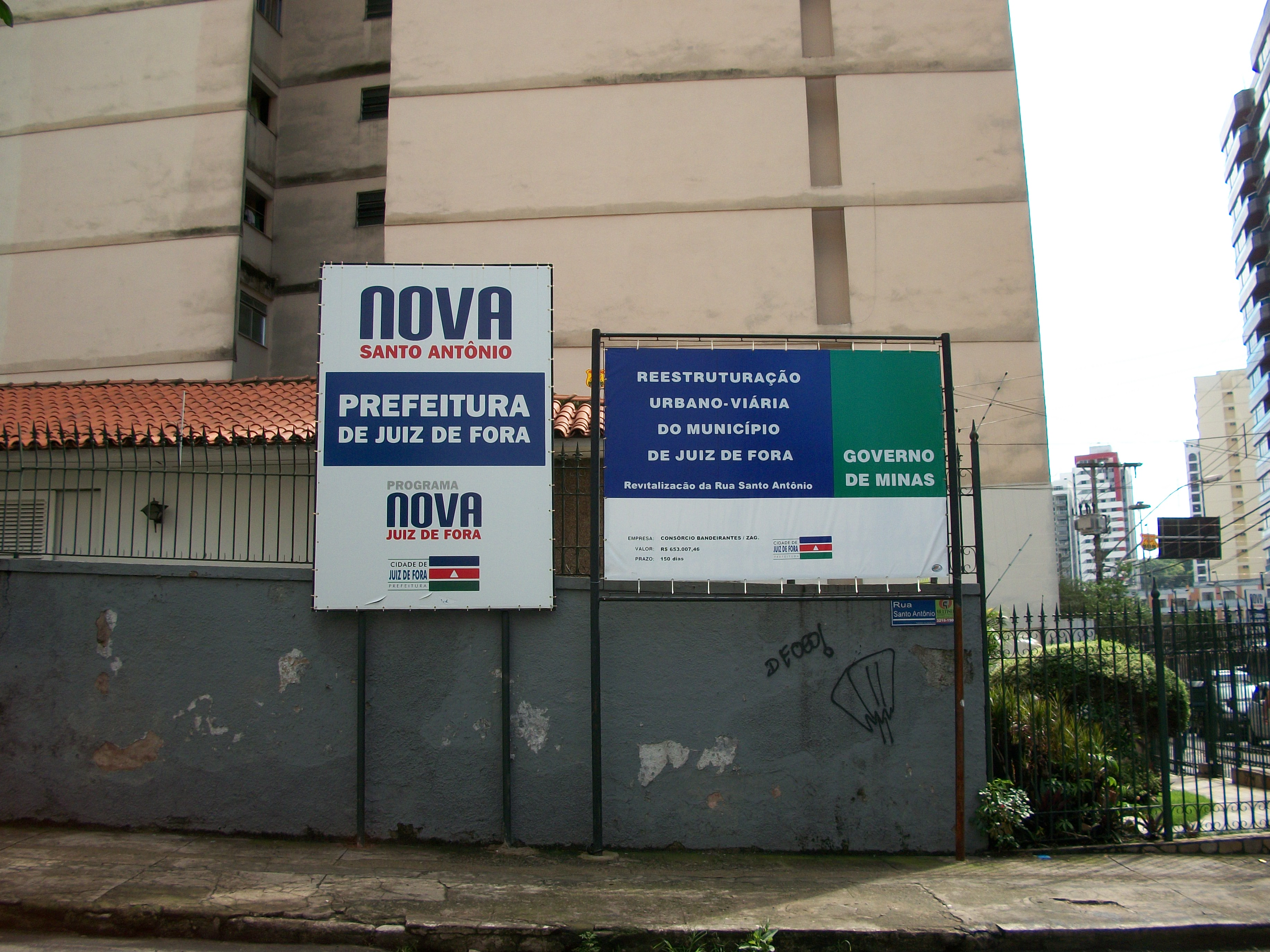 Placa do Programa AVON Juiz de Fora - Avenida Santo Antônio. Ao lado direito, a placa com informações oficiais de custo, duração, objetivo e empresas envolvidas.